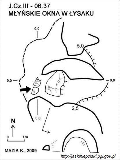 Młyńskie Okna w Łysaku - plan